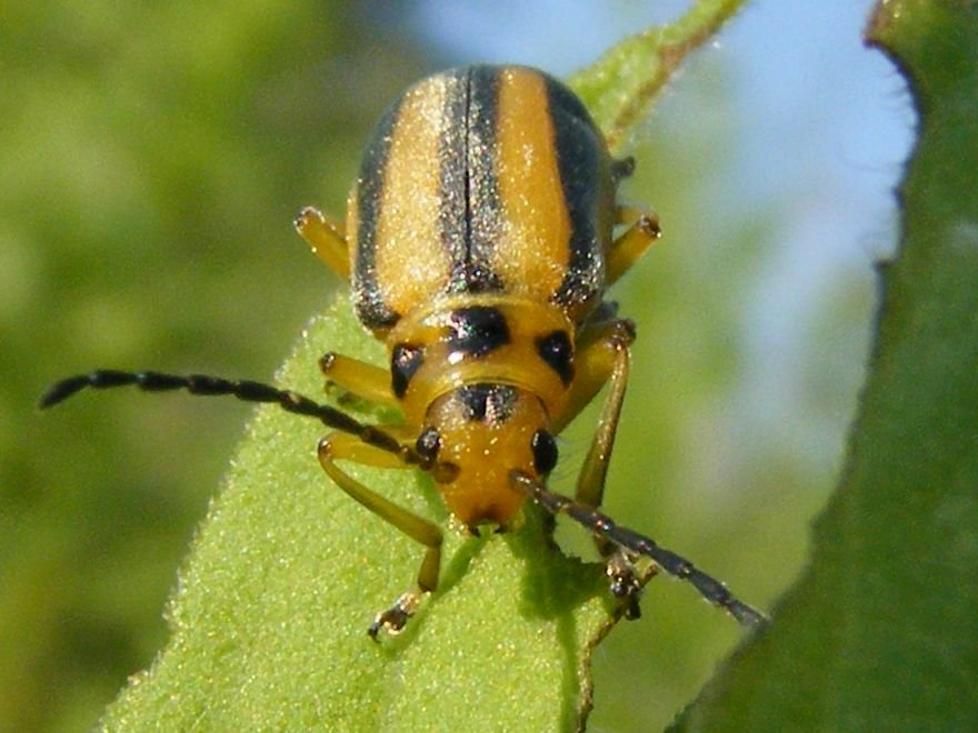 Trirhabda canadensis (Chrysomèle à quatre bandes)